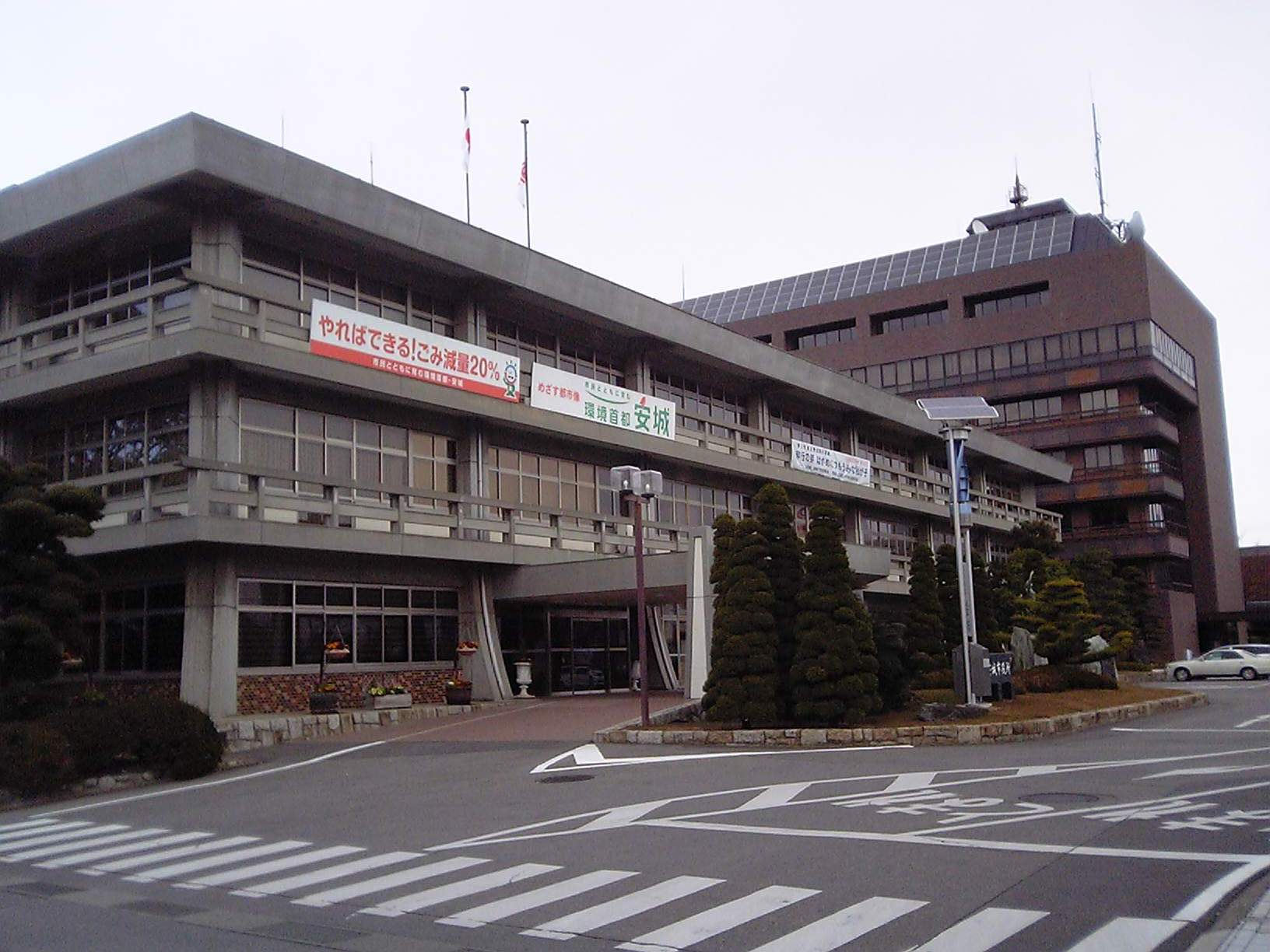 愛知県安城市の安城市役所。